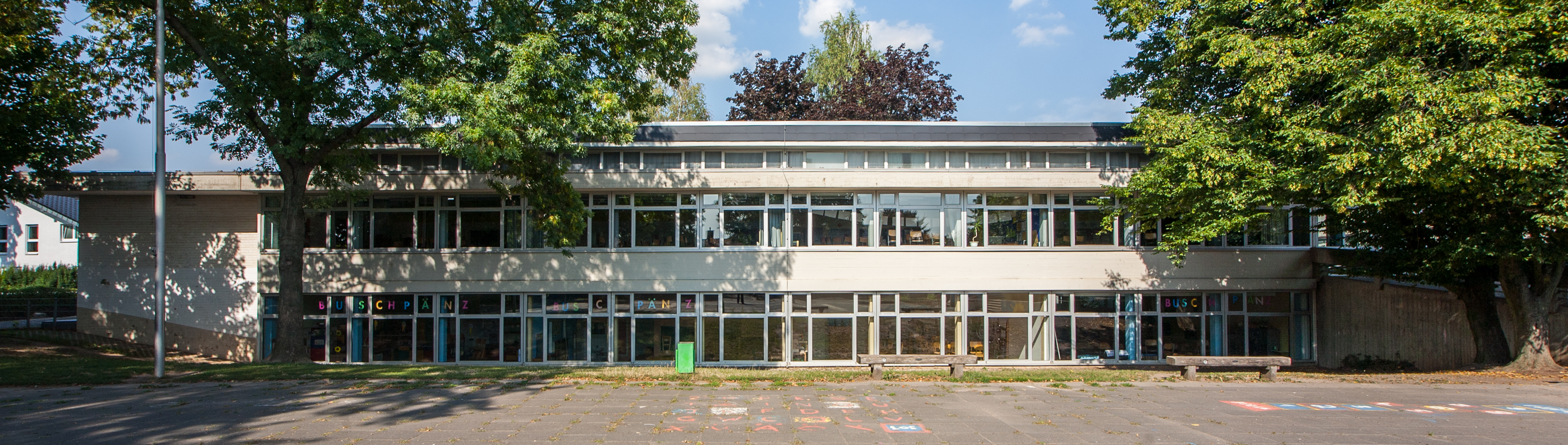 Katholische Grundschule Buschdorf, Von-den-Driesch-Straße 2, Bonn-Buschdorf (vormals Volksschule Buschdorf)